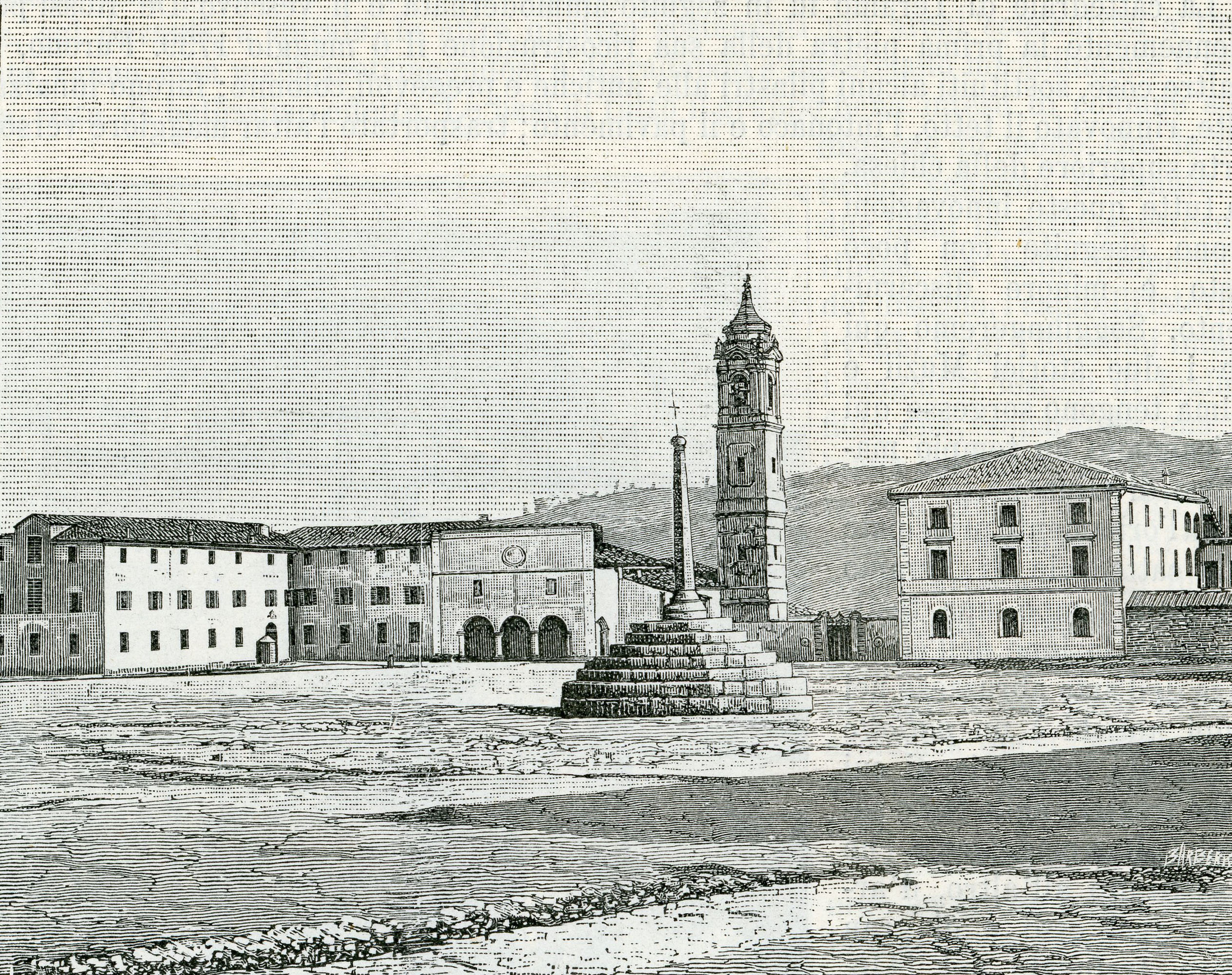 Teramo: chiesa di Santa Maria delle Grazie e distretto militare (xilografia di Barberis 1898).